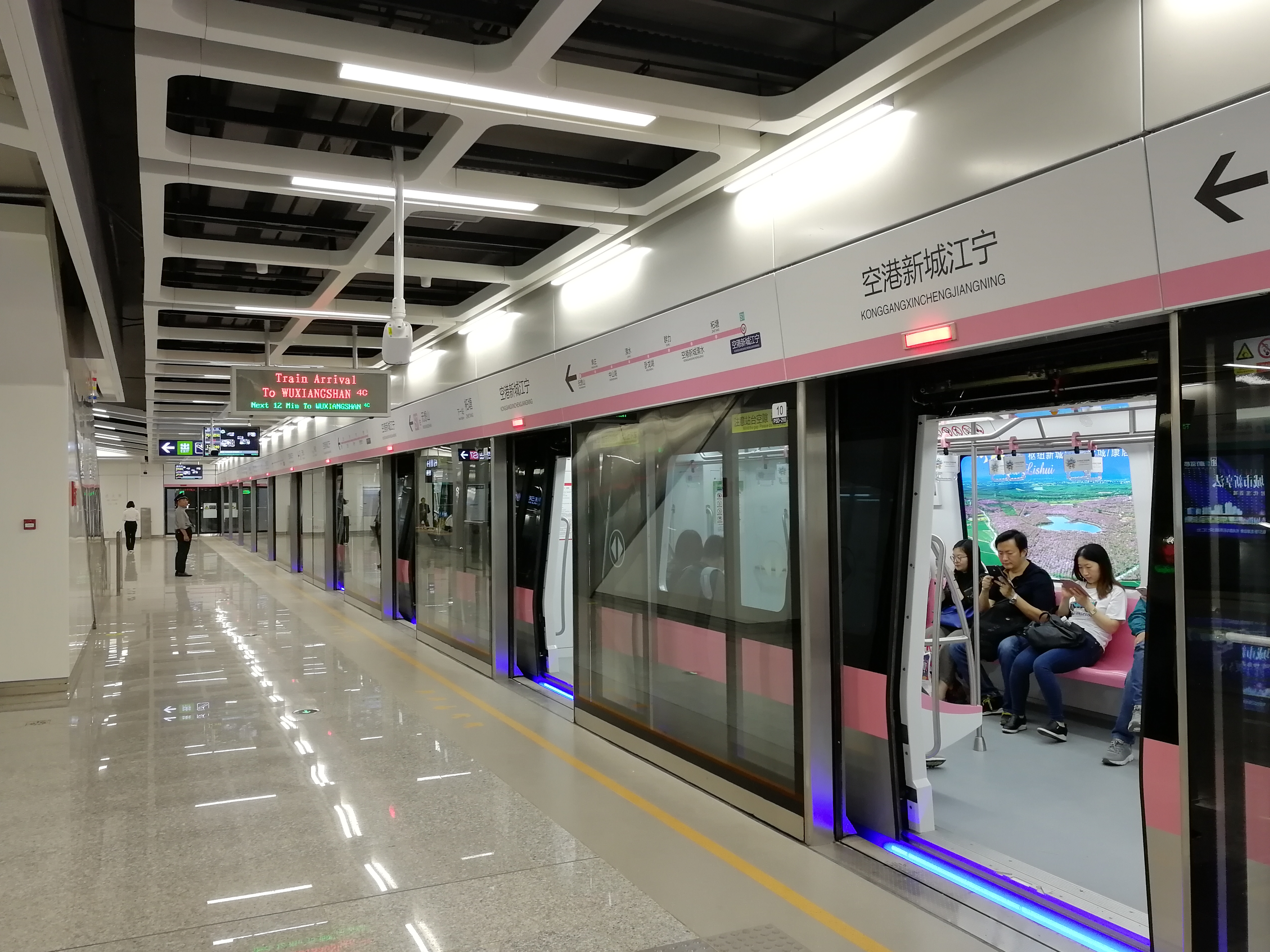 中文（中国大陆）: 南京地铁空港新城江宁站S7号线站台